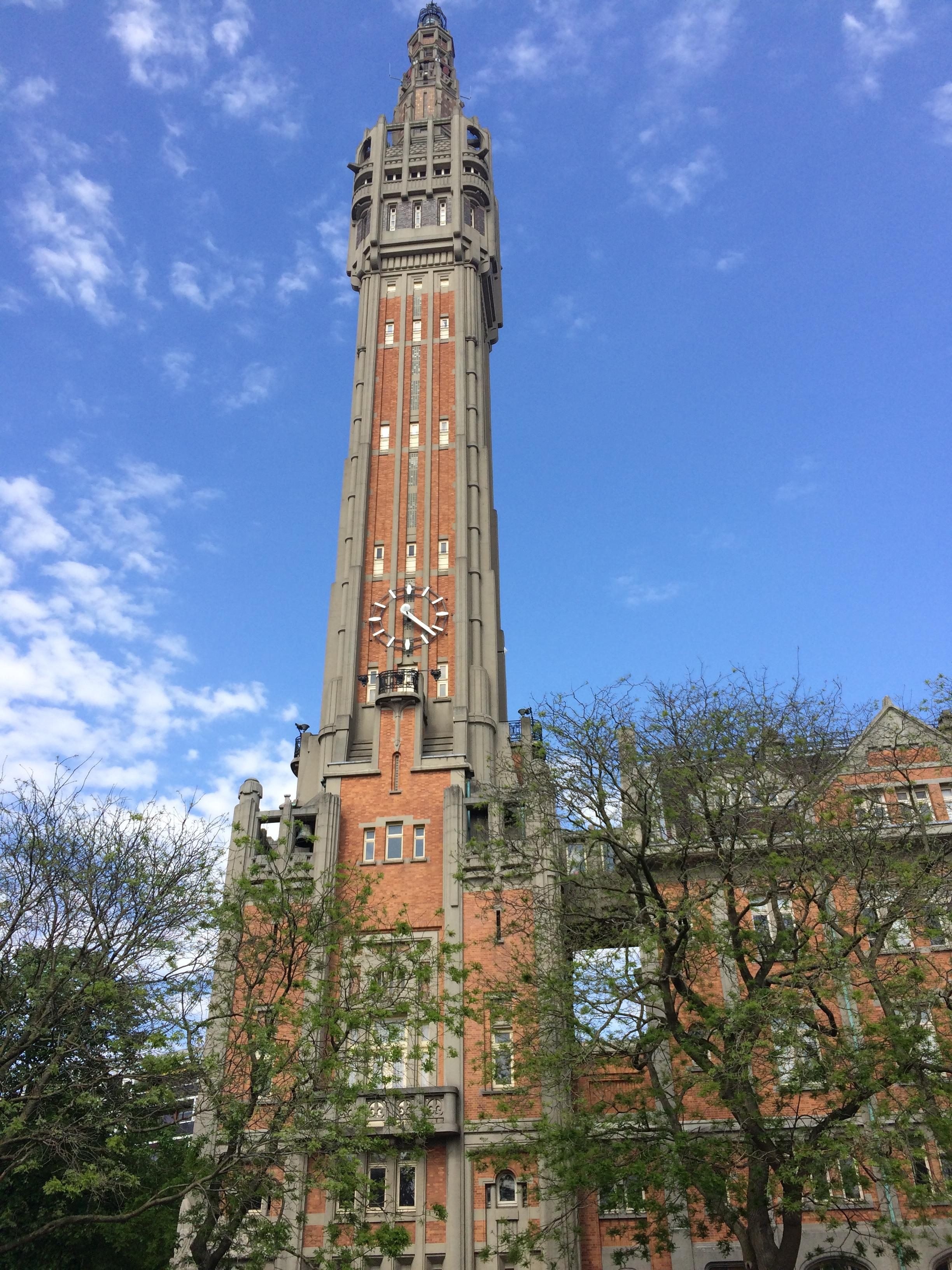 Beffroi